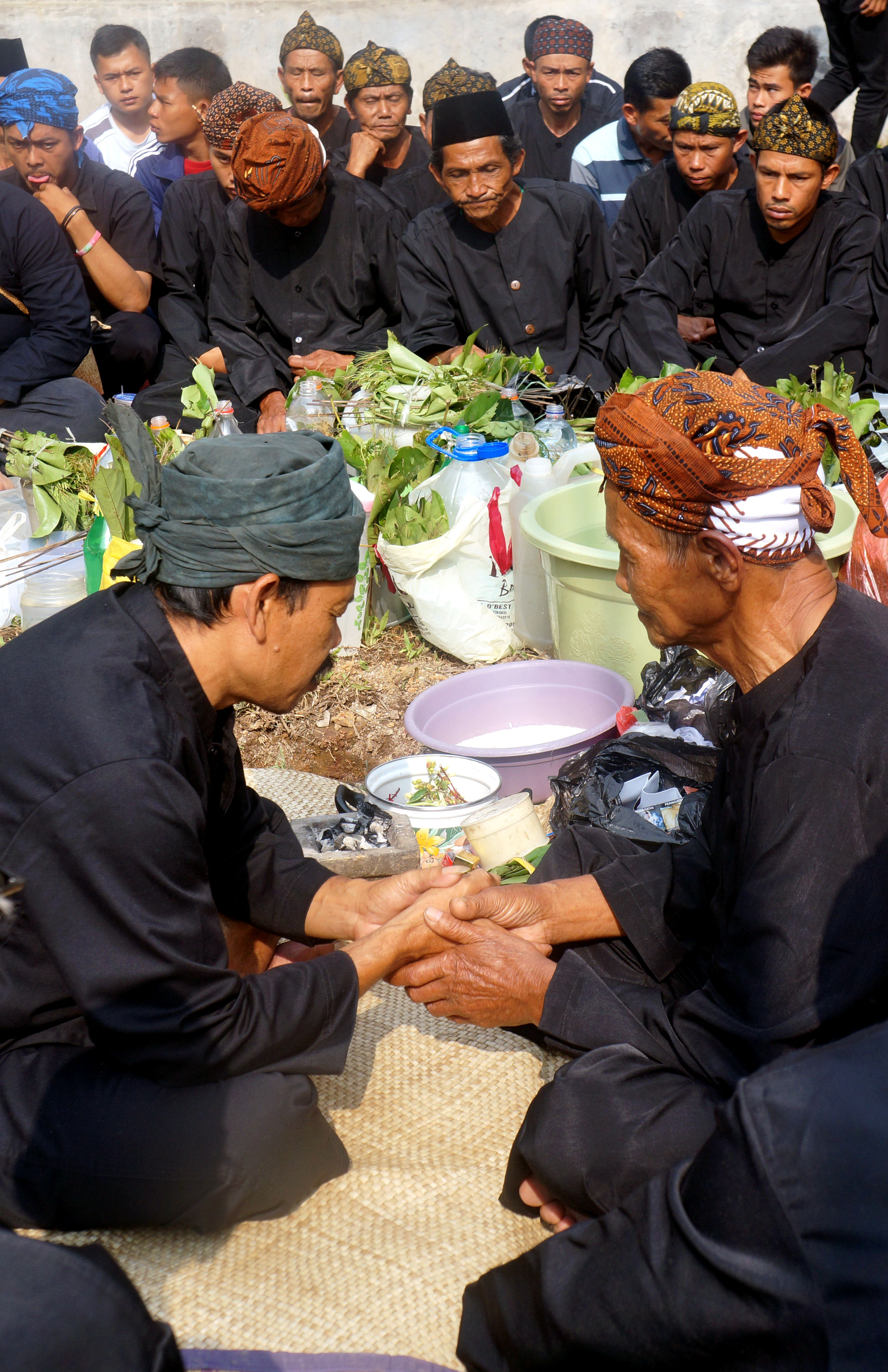 Cérémonie du Seren Tahun (Nouvel An sundanais) dans le village de Malasari, kabupaten de Bogor, Indonésie